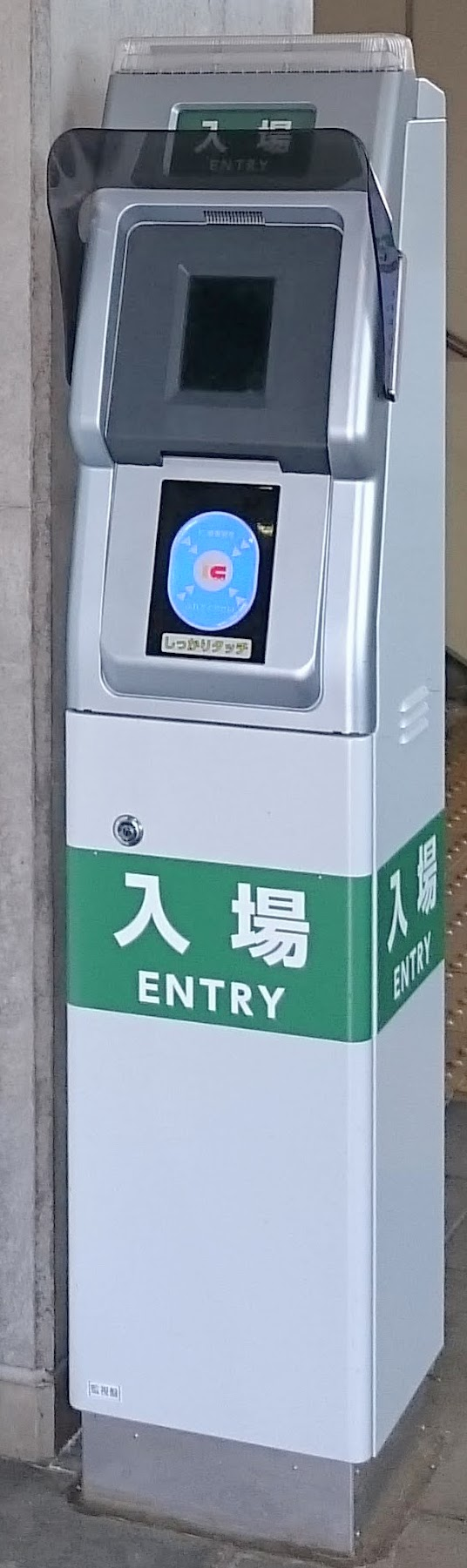 北長岡駅に設置されている簡易Suica改札機の外観（入場用）、日除けアクリル板付き